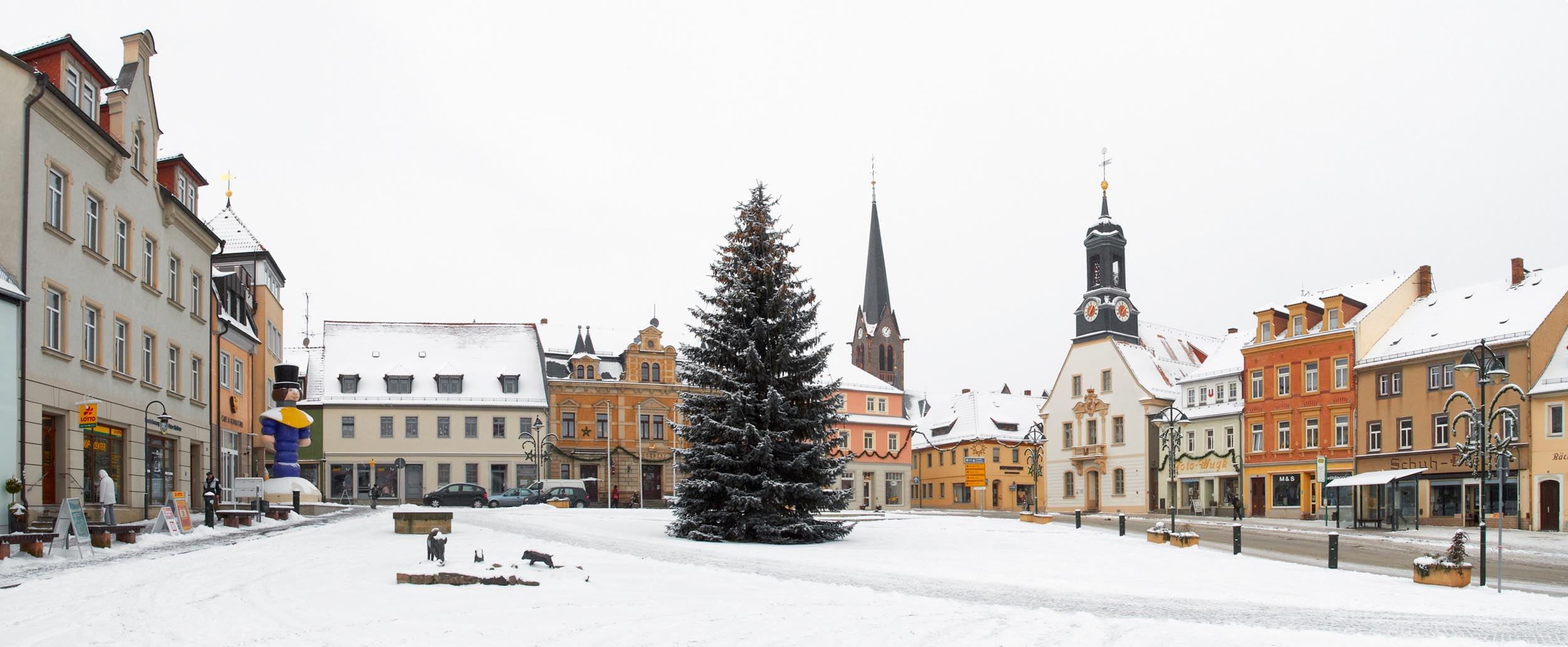 Nordseite des Wilsdruffer Marktes im winterlichen Ambiente.